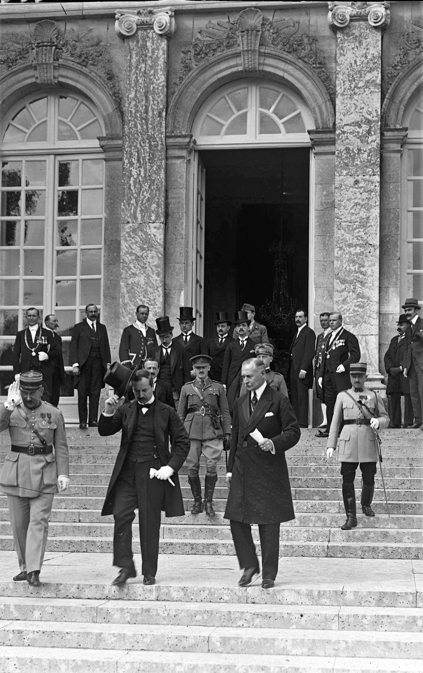 1920. június 4-én, néhány perccel a trianoni békeszerződés aláírása után Benárd Ágost küldöttségvezető (balra, cilinderrel a kezében) és Drasche-Lázár Alfréd rendkívüli követ, államtitkár (jobbra, fedetlen fővel) elhagyja a versailles-i Nagy Trianon kastélyt